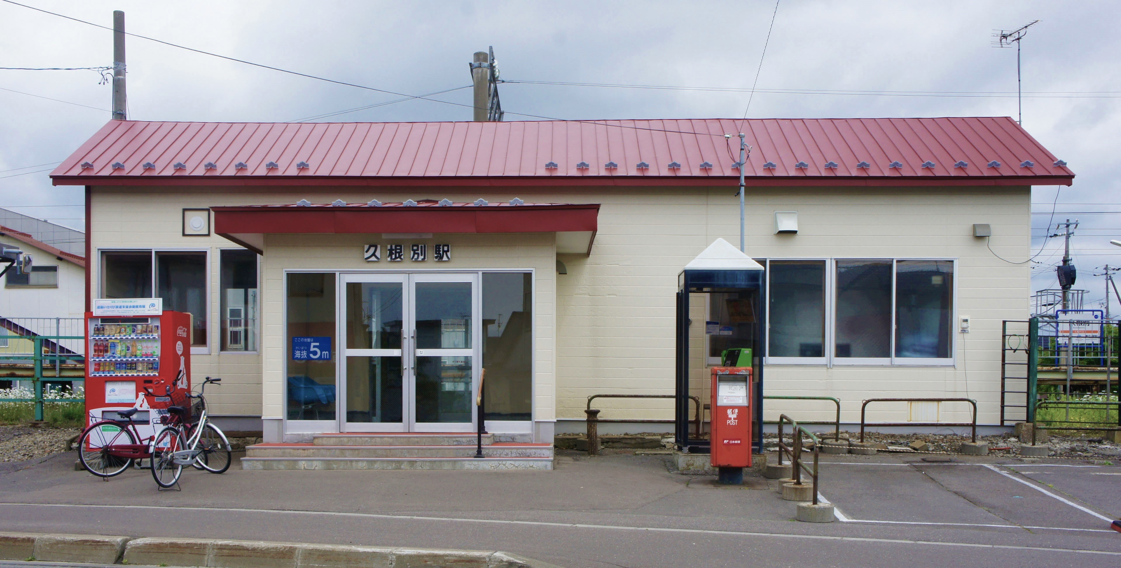 道南いさりび鉄道線・久根別駅の駅舎